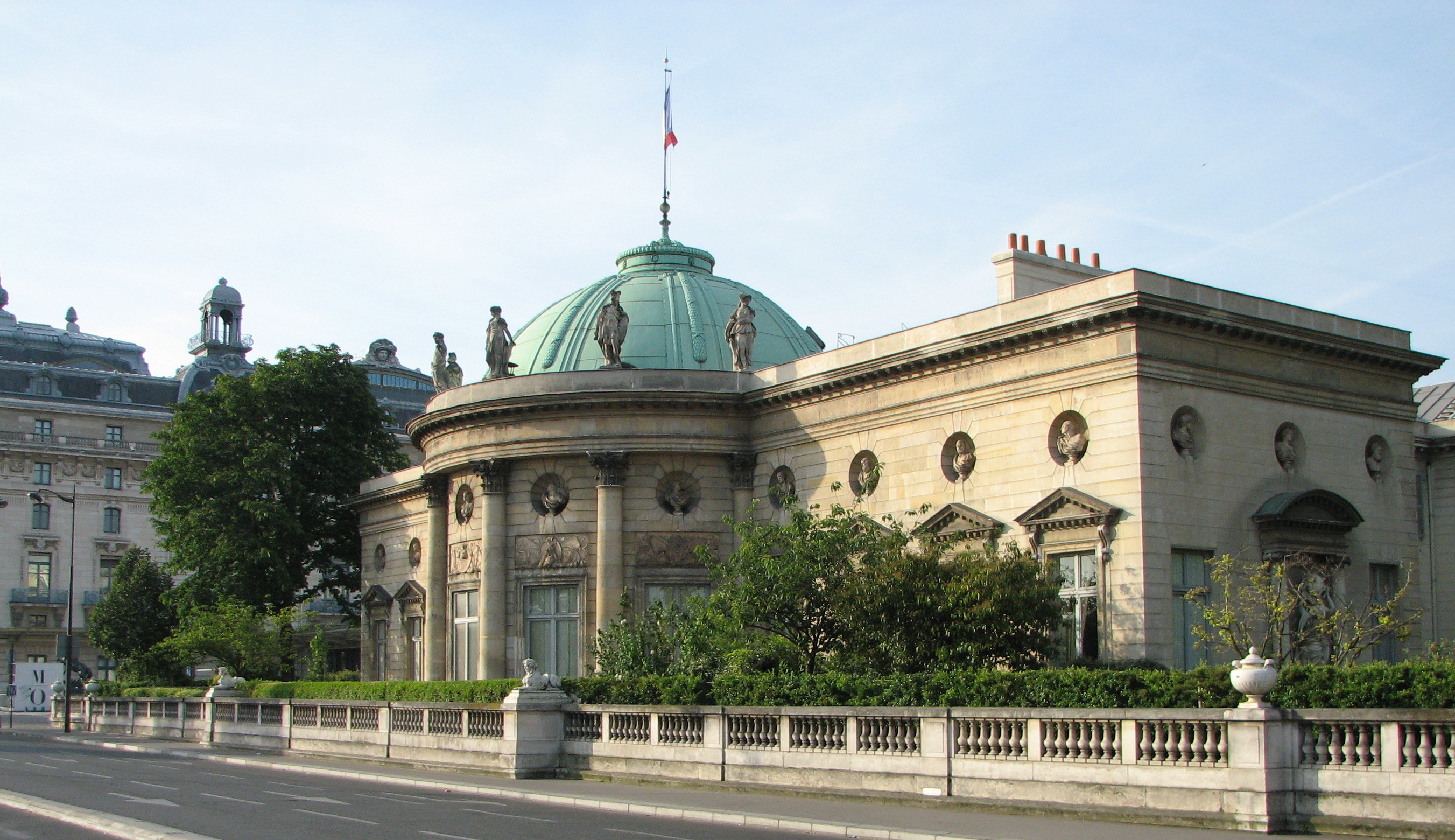 Palais de la Légion d'honneur (ou hôtel de Salm) vu du quai de Seine. Le musée d'Orsay en arrière plan.